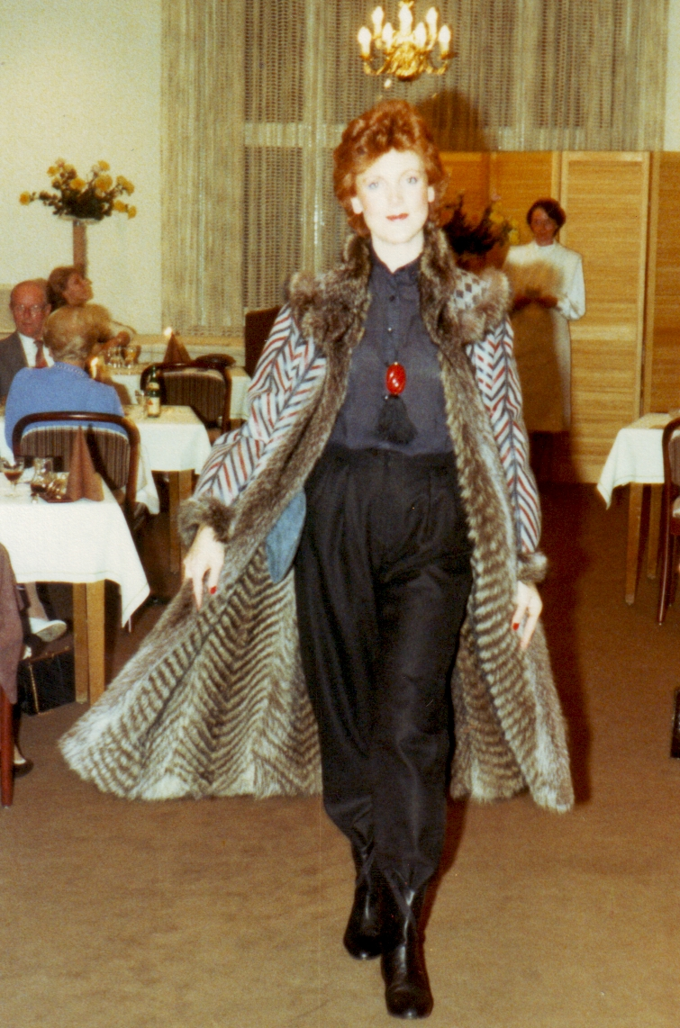 Pelzmodelle Fahnenstich, Recklinghausen Modenschau 1983 Galonierter Waschbär-Wendemantel